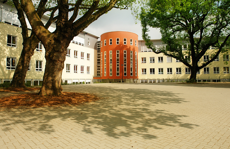 Franz Sales Schule auf dem Gelände des Franz Sales Hauses in Essen an der Steeler Straße.